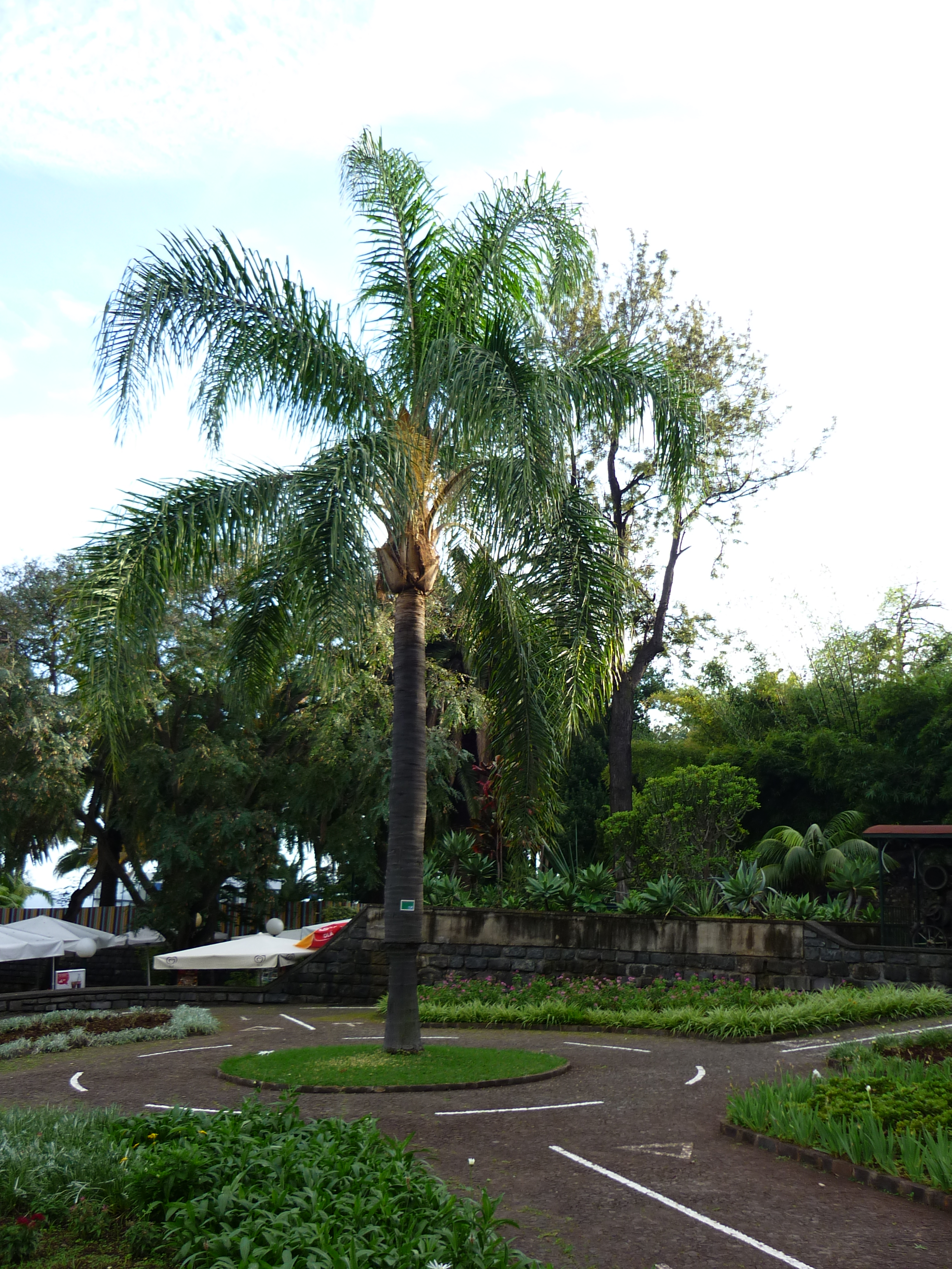 Királynőpálma (Syagrus romanzoffiana) Funchalban, a Szent Katalin parkban